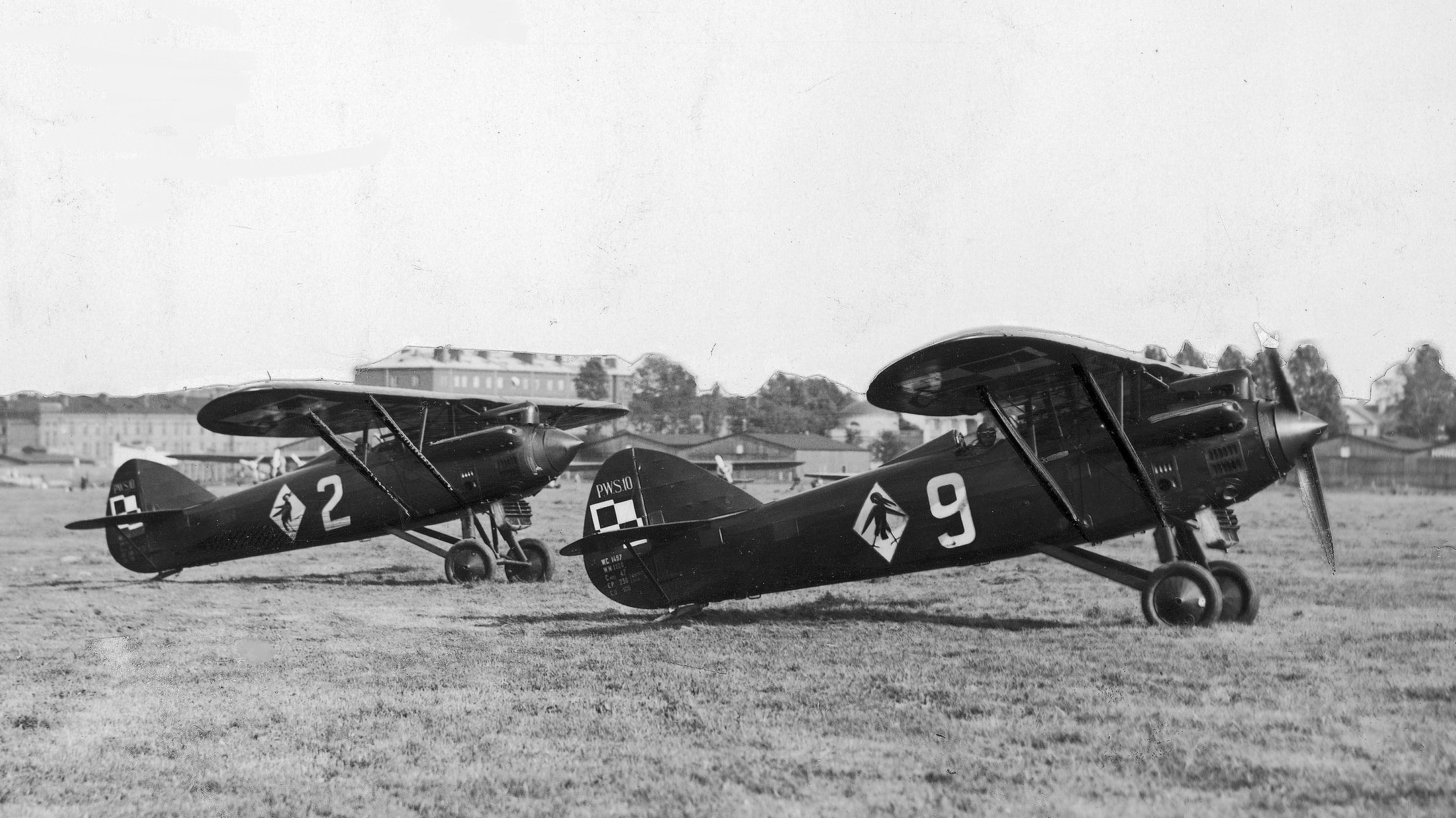 Startujące samoloty PWS-10 3 Pułku Lotniczego; czerwiec 1932.